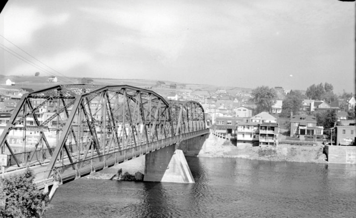 Troisième pont David-Roy sur la rivière Chaudière à Saint-Georges